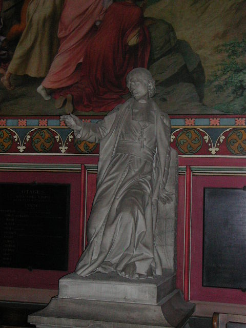 Jean-Marie Bonnassieux (Français, 1810-1892): Tombeau de monseigneur Georges Darboy (assassiné en 1871), Paris, Cathédrale Notre-Dame de Paris, chapelle Saint-Georges.